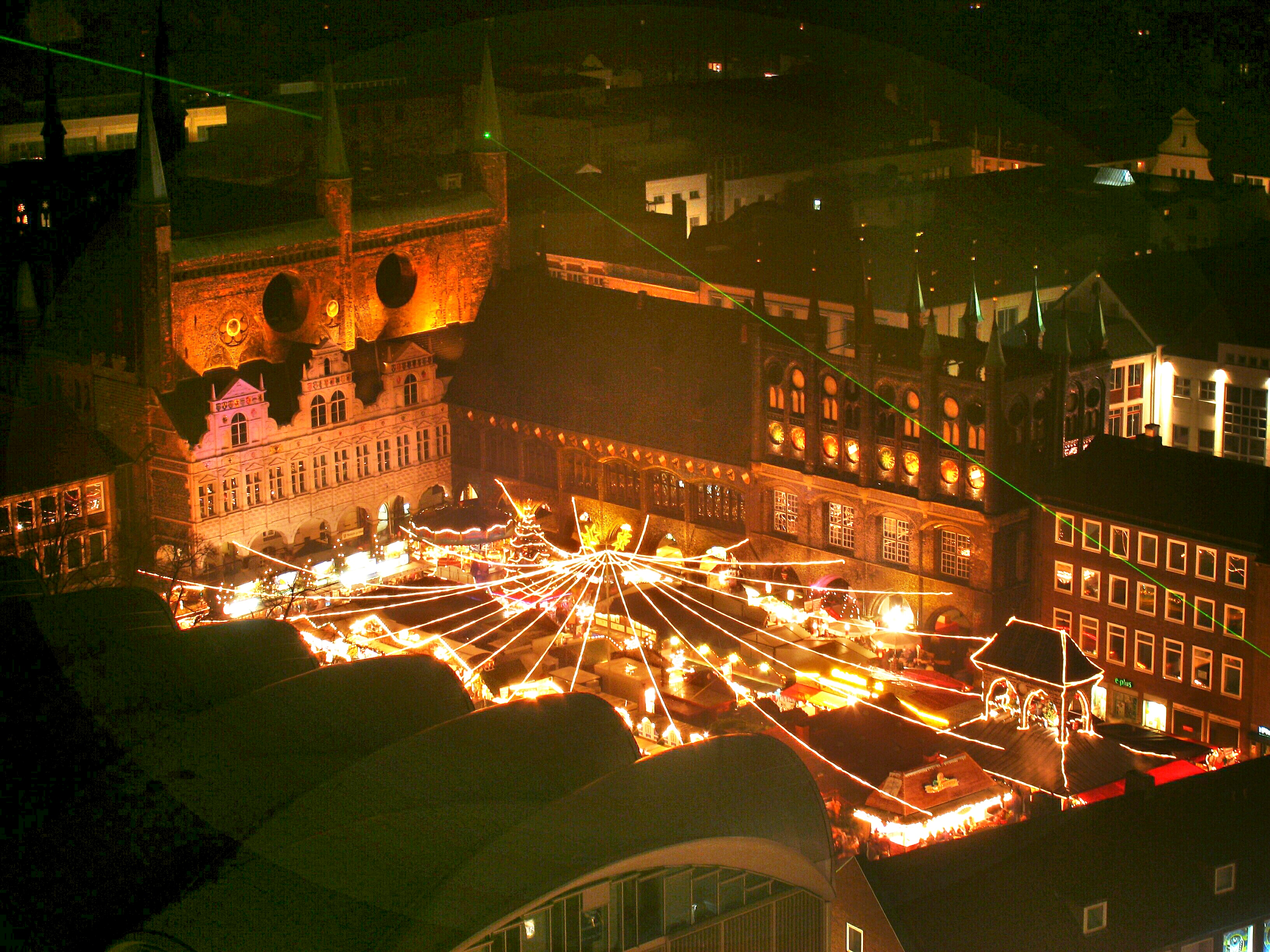 Lübeck Christmas Market 2005 / Lübecker Weihnachtsmarkt 2005